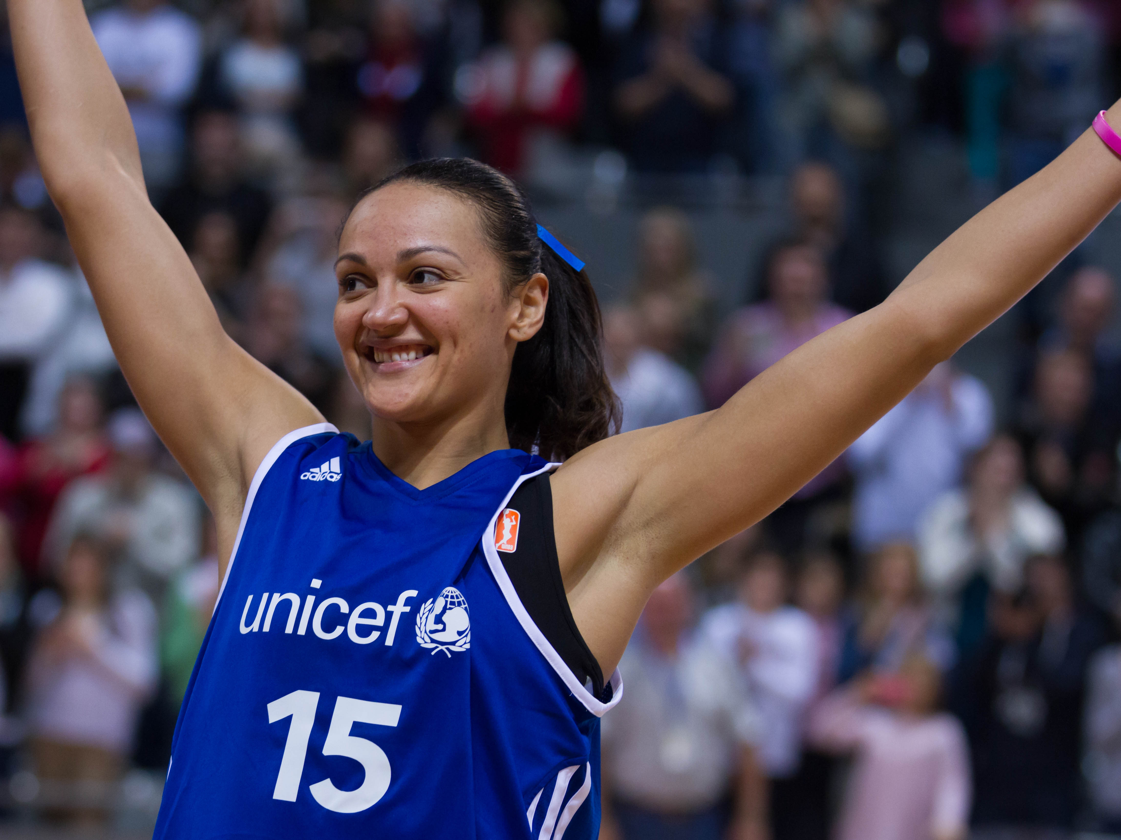 Mistie Bass, match de gala championnes de cœur